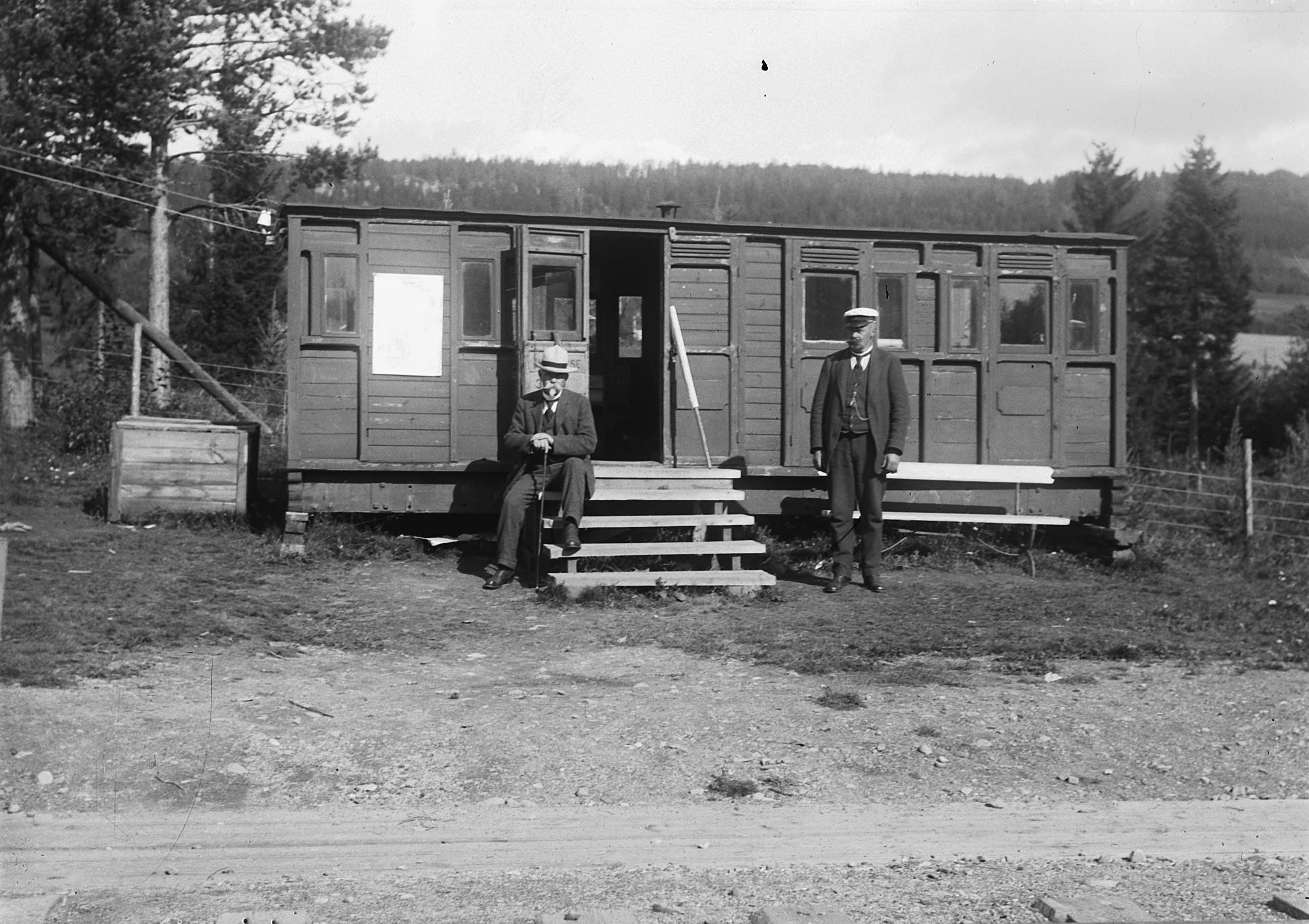 Rudshøgda fikk eget stoppested på Dovrebanen i 1915 og ble fast jernbanestasjon i 1917.